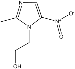 Struktura chemicza metronidazolu